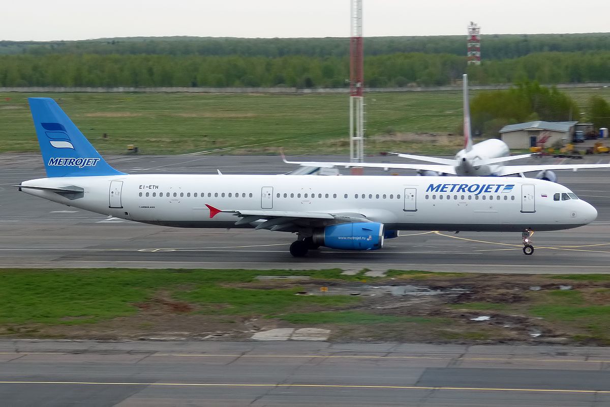 MetroJet, EI-ETH, Airbus A321-231